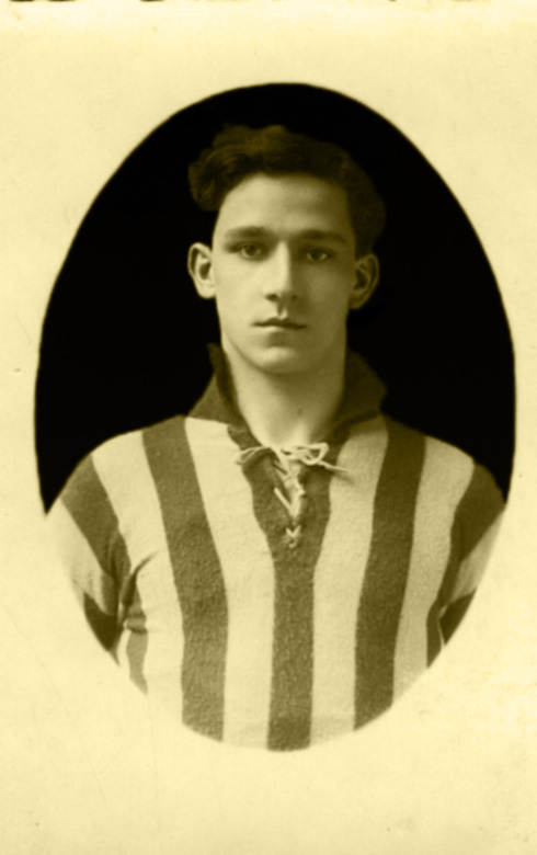 August Hellemans - Eigen werk via een gescande foto uit 1926 - fotograaf onbekend